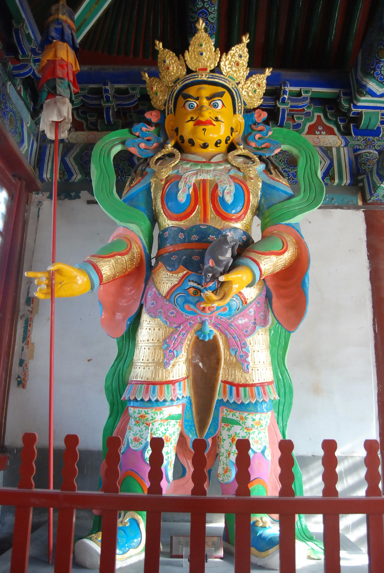 北京妙应寺中的北方多聞天王（梵文：Vaisramana）